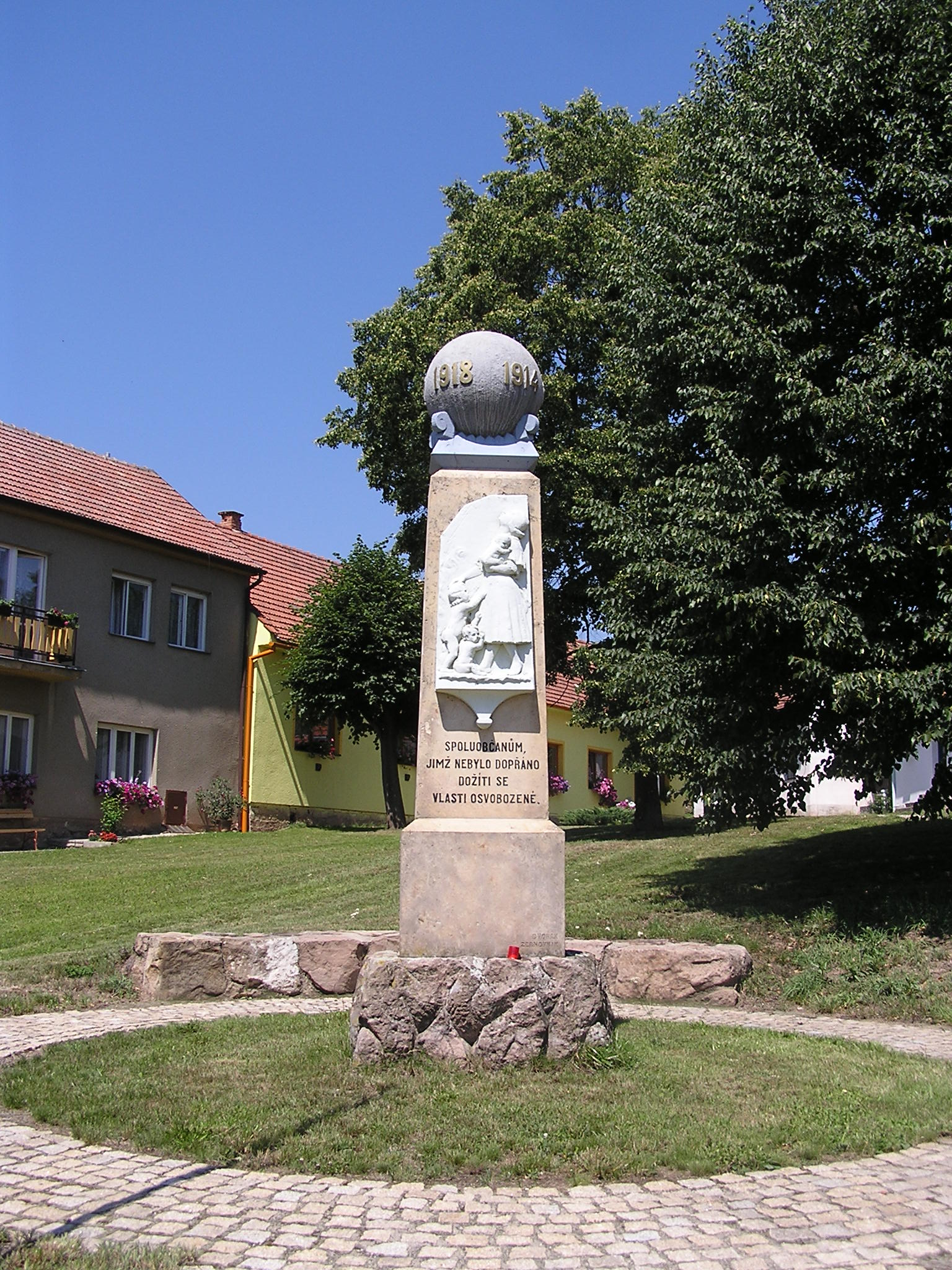 Obec Býkovice, okr. Blansko - náves s pomníkem padlých v 1. světové válce